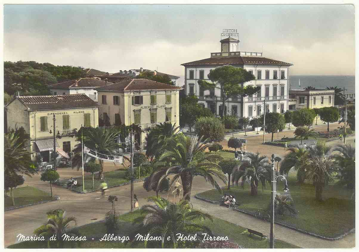 MS Marina di Massa - Albergo Milano e Hotel Torino